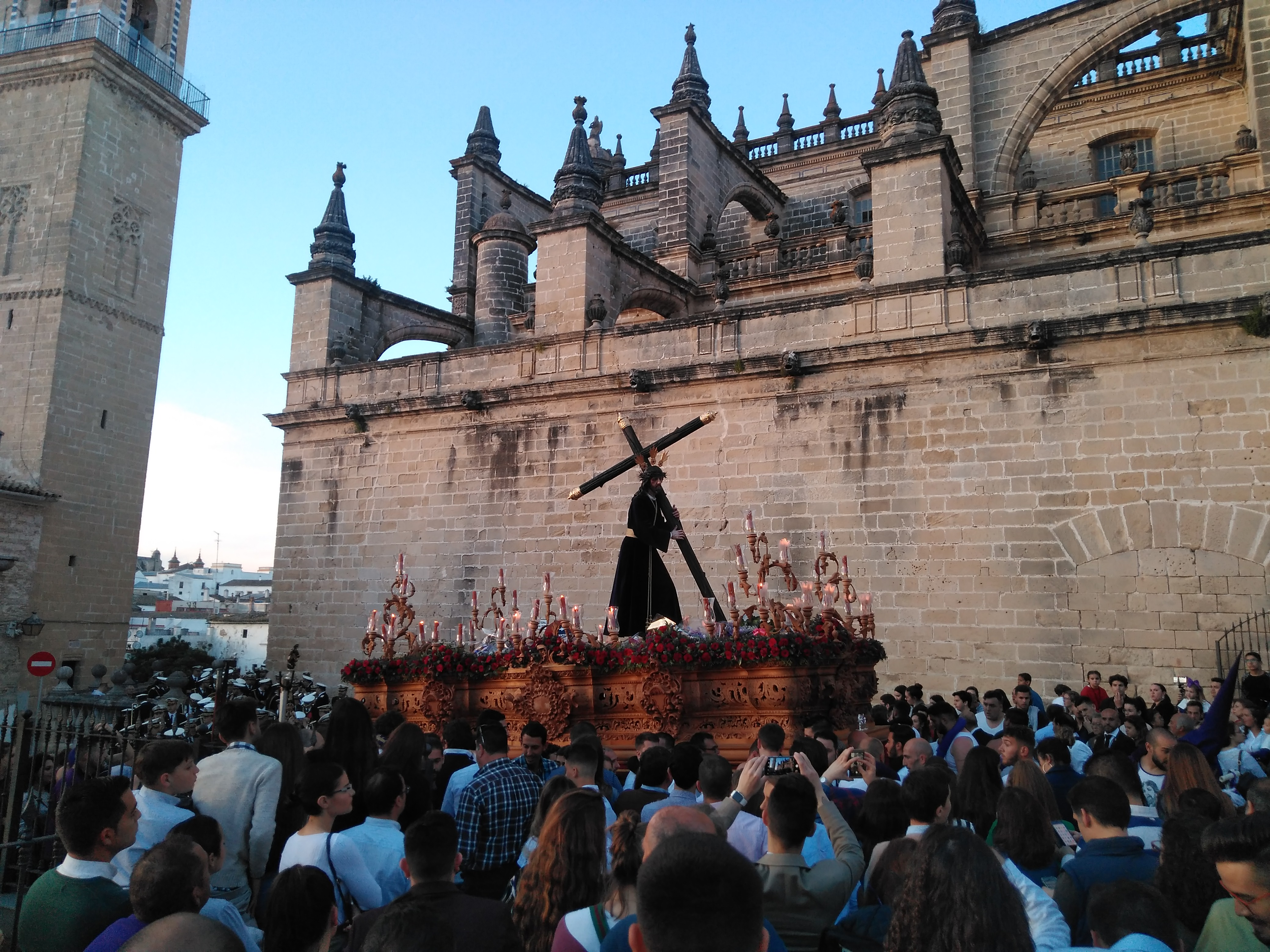 Hermandad de la Sed (Jerez, España)